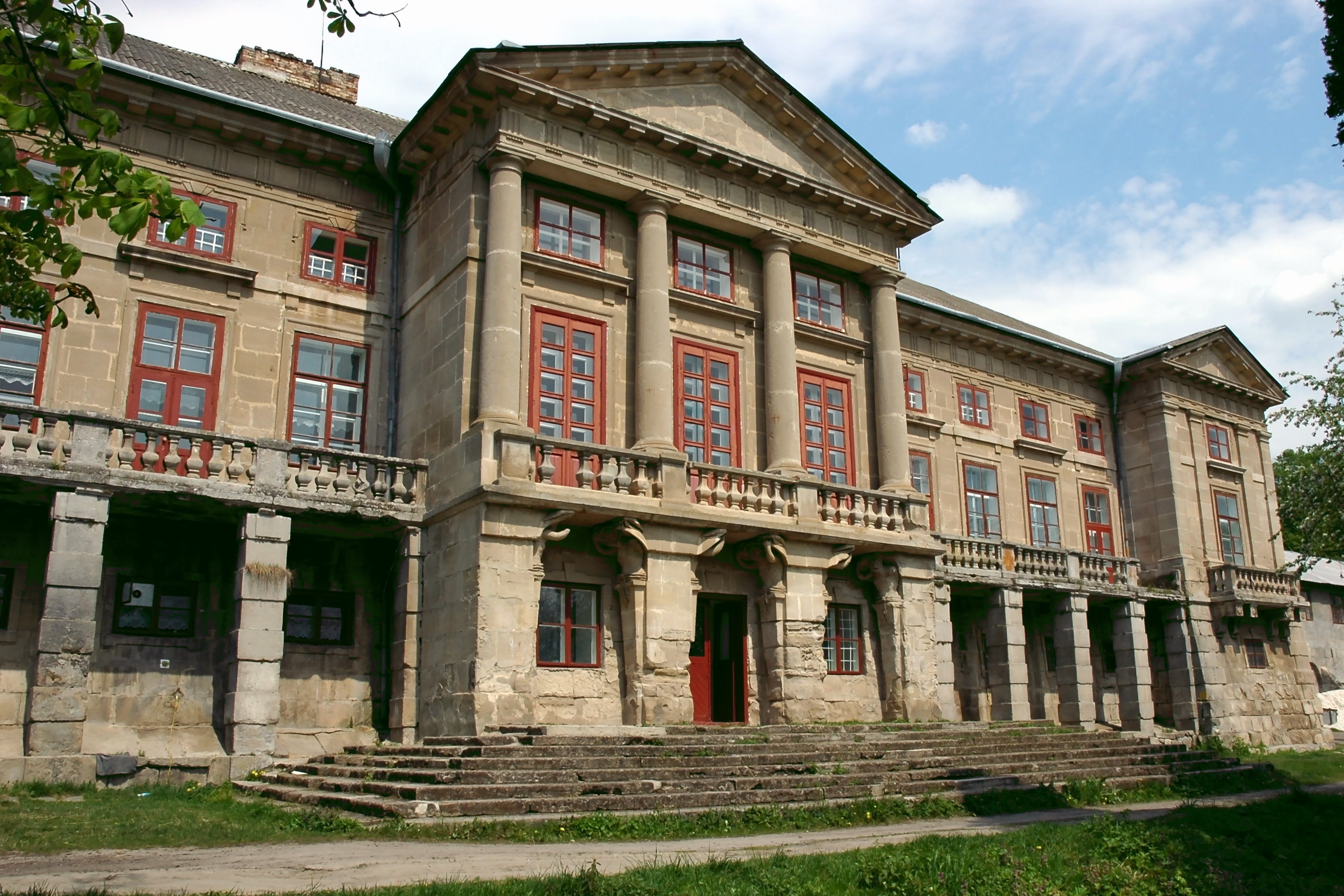 Південний фасад маєтку в Маліївцях